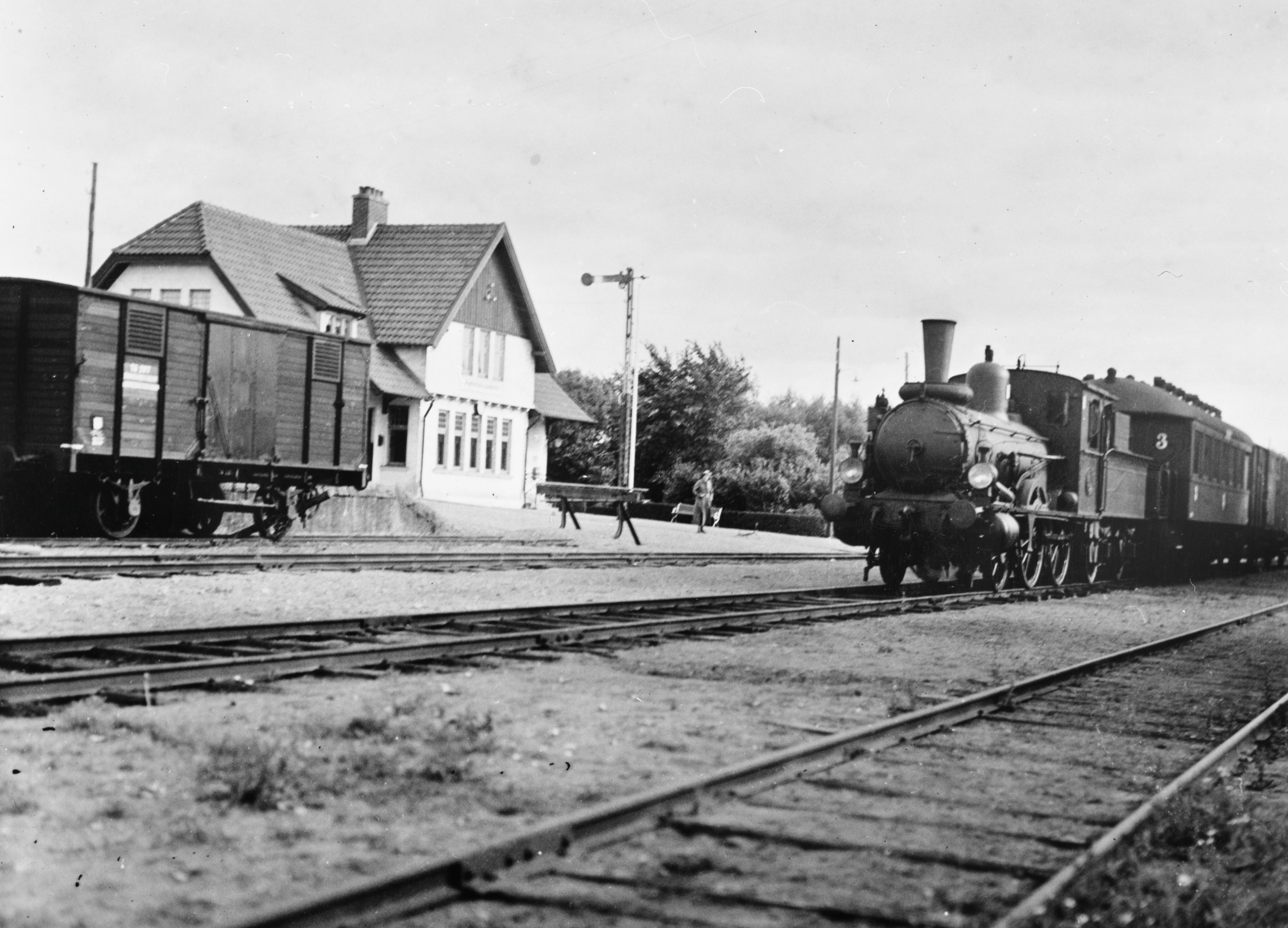 Kävlinge - Barsebäck Järnväg Bahnhof Barsebäck 1934 zu SJ-Zeit